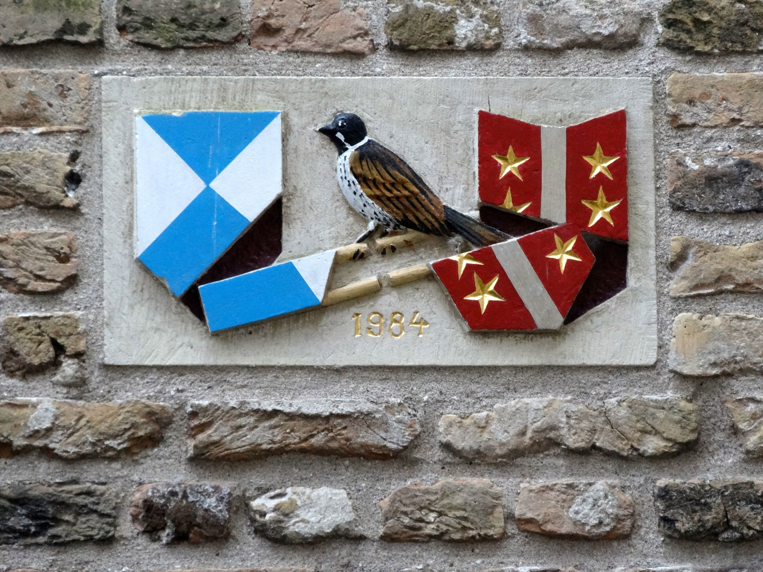 Rietgors, gevelsteeen 1984, Achter de Kerk, Gouda